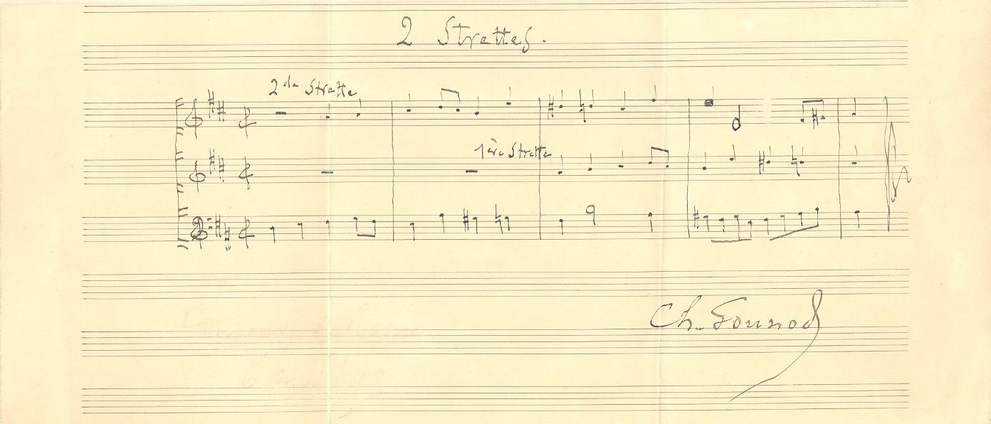 Albumblatt Charles Gounod mit eigenhändigem Notenzitat (2 Strettes, 3 Zeilen, 5 Takte) unb Unterschrift, Notenpapier, ohne Ort, ohne Datum